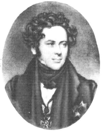 Antony Pogorelsky (1787-1836)